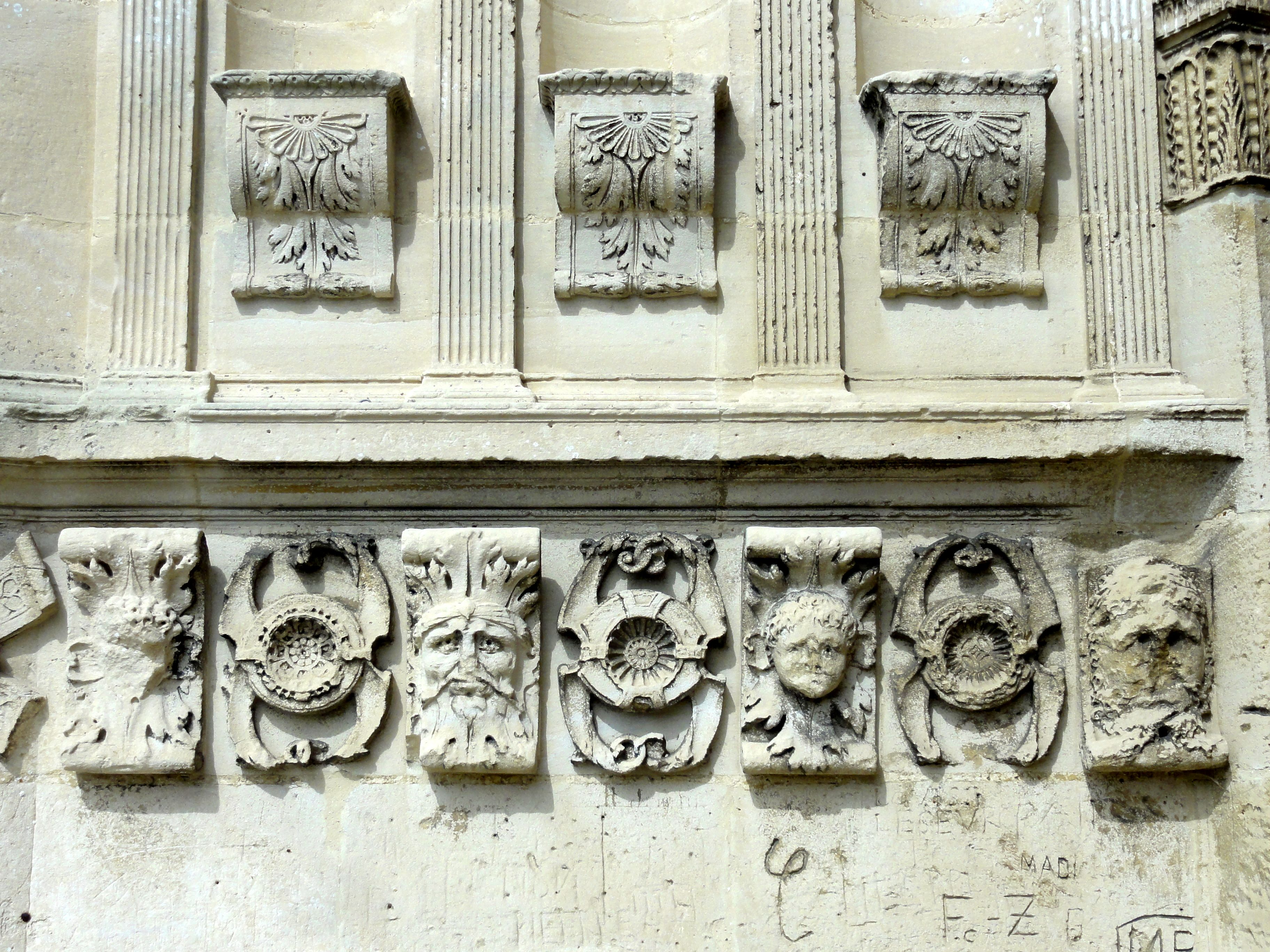 Détail du portail.